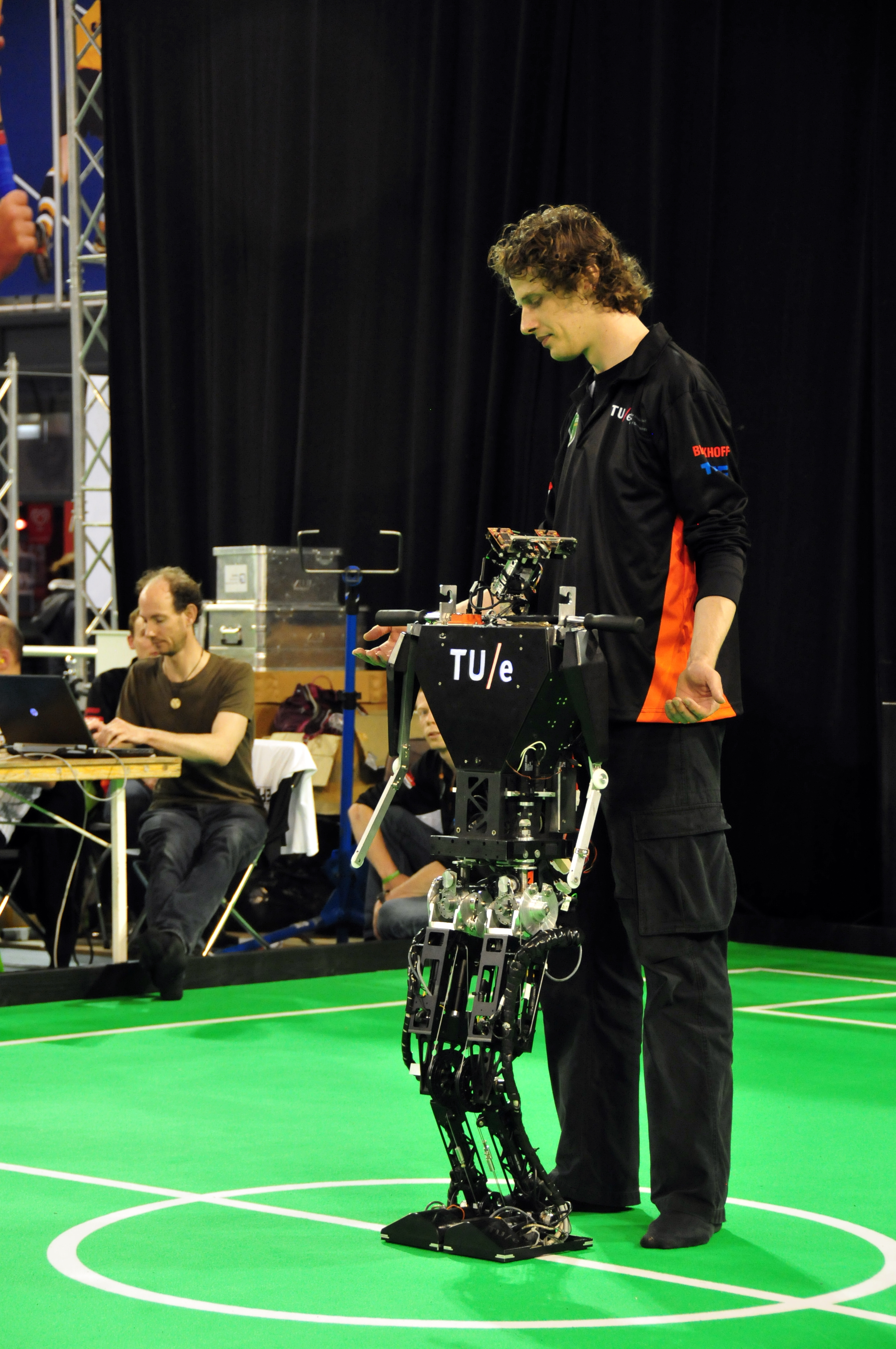 Eindhoven, Niederlande, 2013